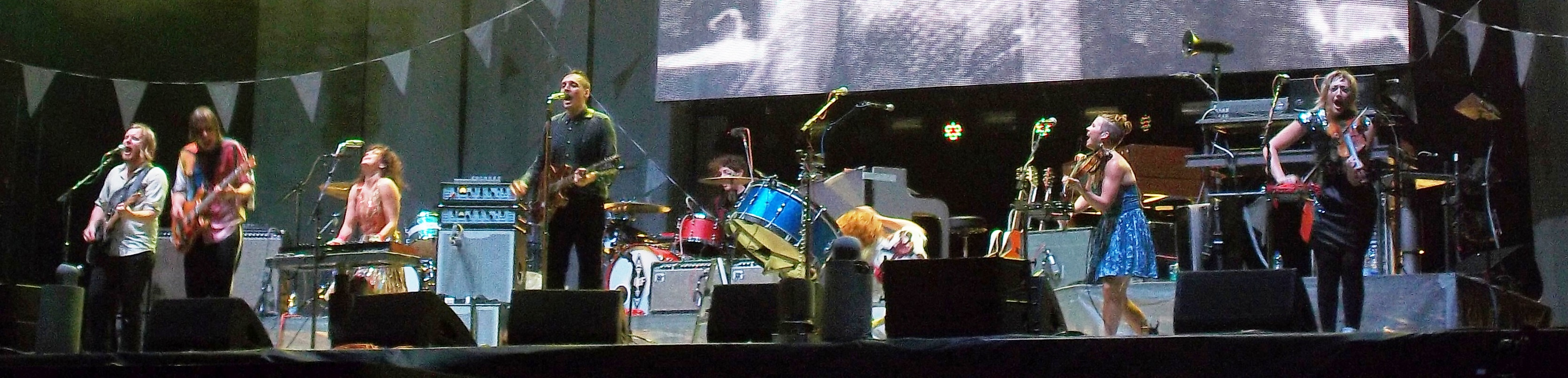 Spectacle gratuit d'Arcade Fire présenté et diffusé en direct par SiriusXM Canada le 22 septembre 2011 à 21:00 à la place des Festivals de Montréal